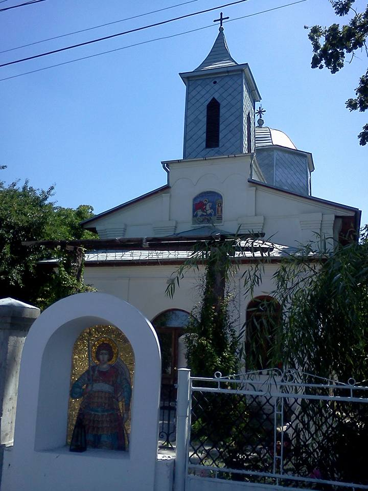 Biserica „Sf. Gheorghe”